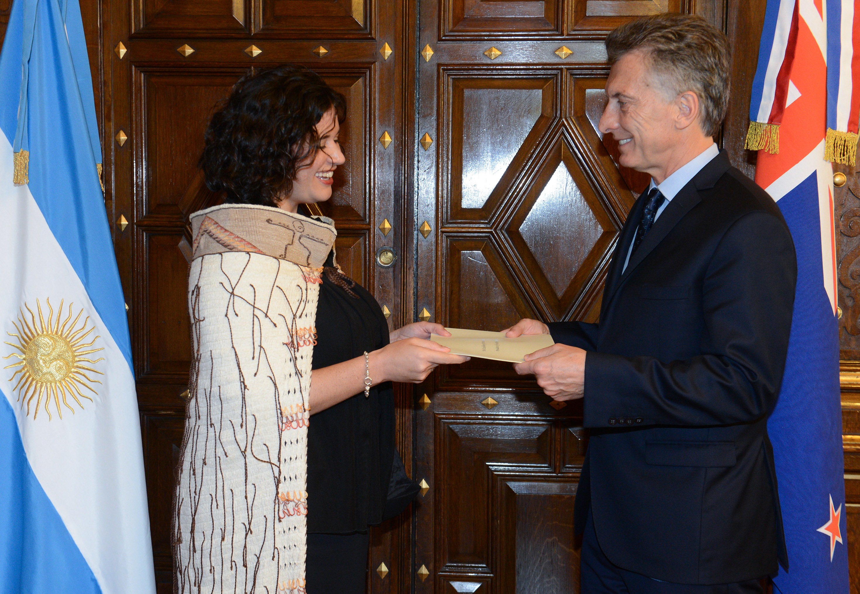 El presidente Mauricio Macri recibió ayer las cartas credenciales de los embajadores de Rumania, Noruega, Eslovenia, Polonia, Serbia, Nueva Zelandia y de la Unión Europea. El acto se realizó este mediodía en el despacho presidencial, donde también asistió la canciller Susana Malcorra. Presentaron sus cartas Carmen Liliana Podgorean (Rumania); Jostein Leiro (Reino de Noruega); Jadranka Šturm Kocjan (Eslovenia); Marek Pernal (Polonia); Jela Bacovic (Serbia); Raylene Liufalani (Nueva Zelanda) y José Ignacio Salafranca (Delegación de la Unión Europea).